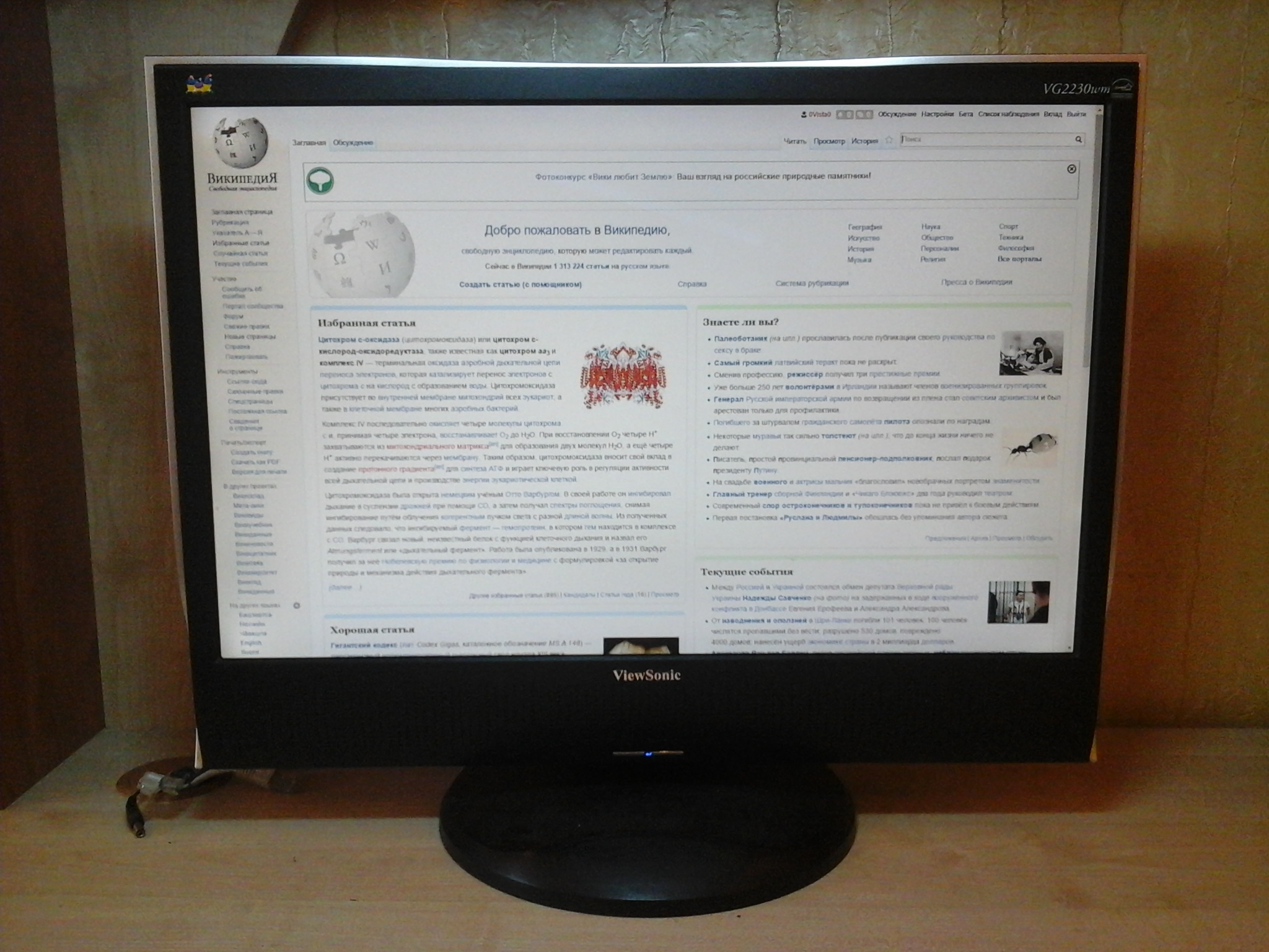 На фотографии изображён 22-ух дюймовый монитор ViewSonic VG2230wm, который отображает главную страницу Википедии.